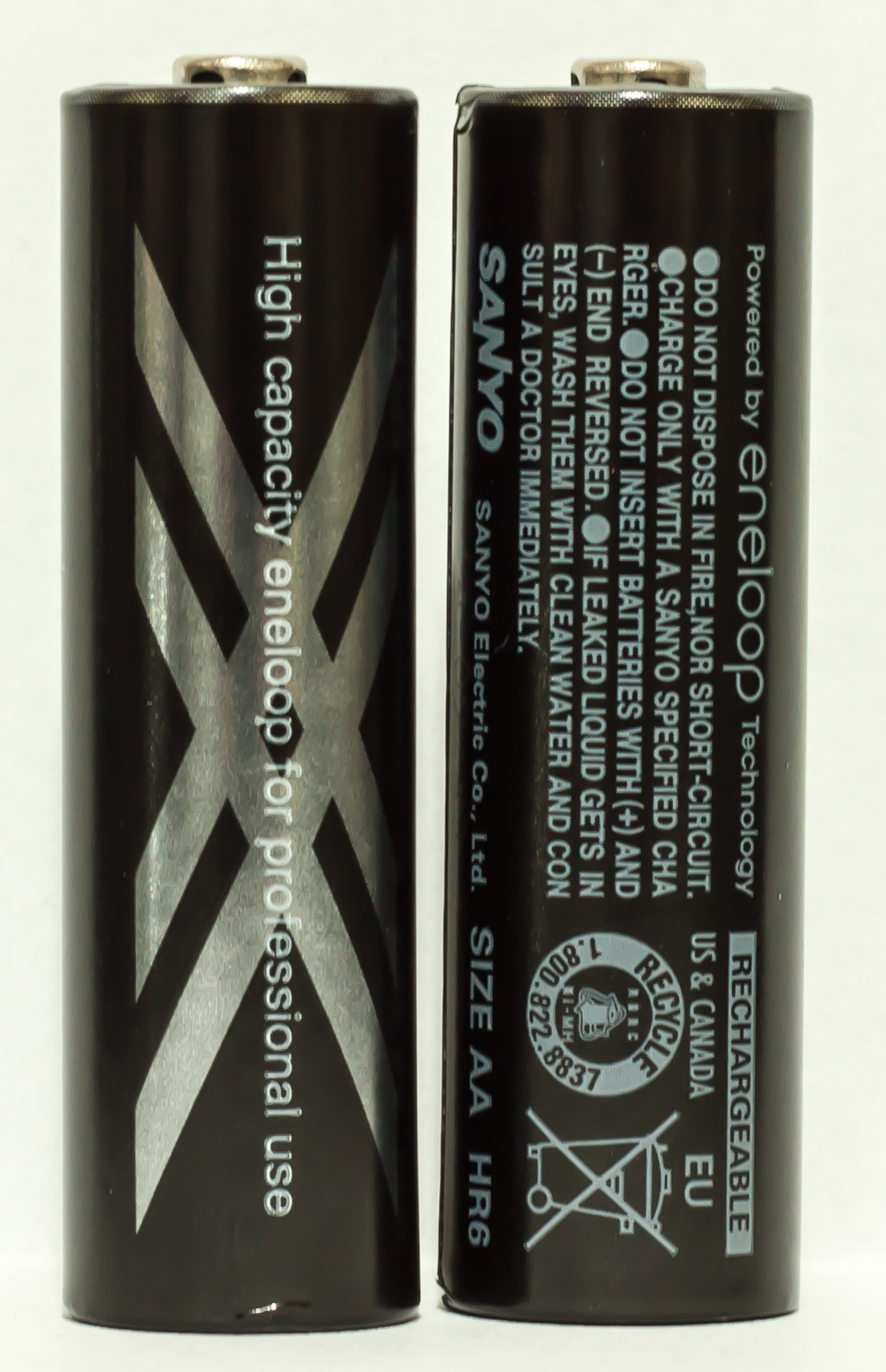 Sanyo Eneloop XX